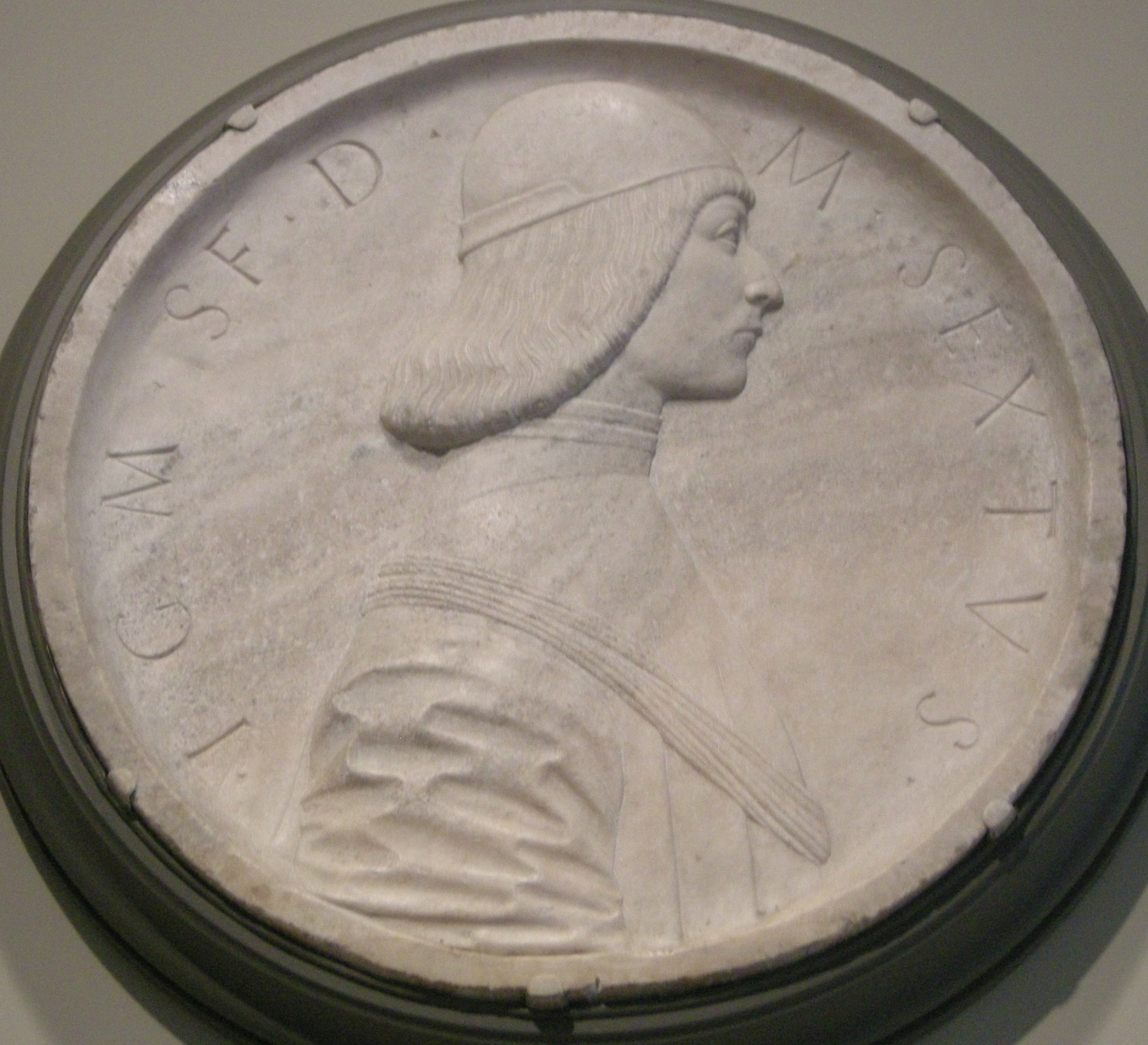 Benedetto briosco (bottega), gian galeazzo maria sforza, duca di milano, 1490 circa